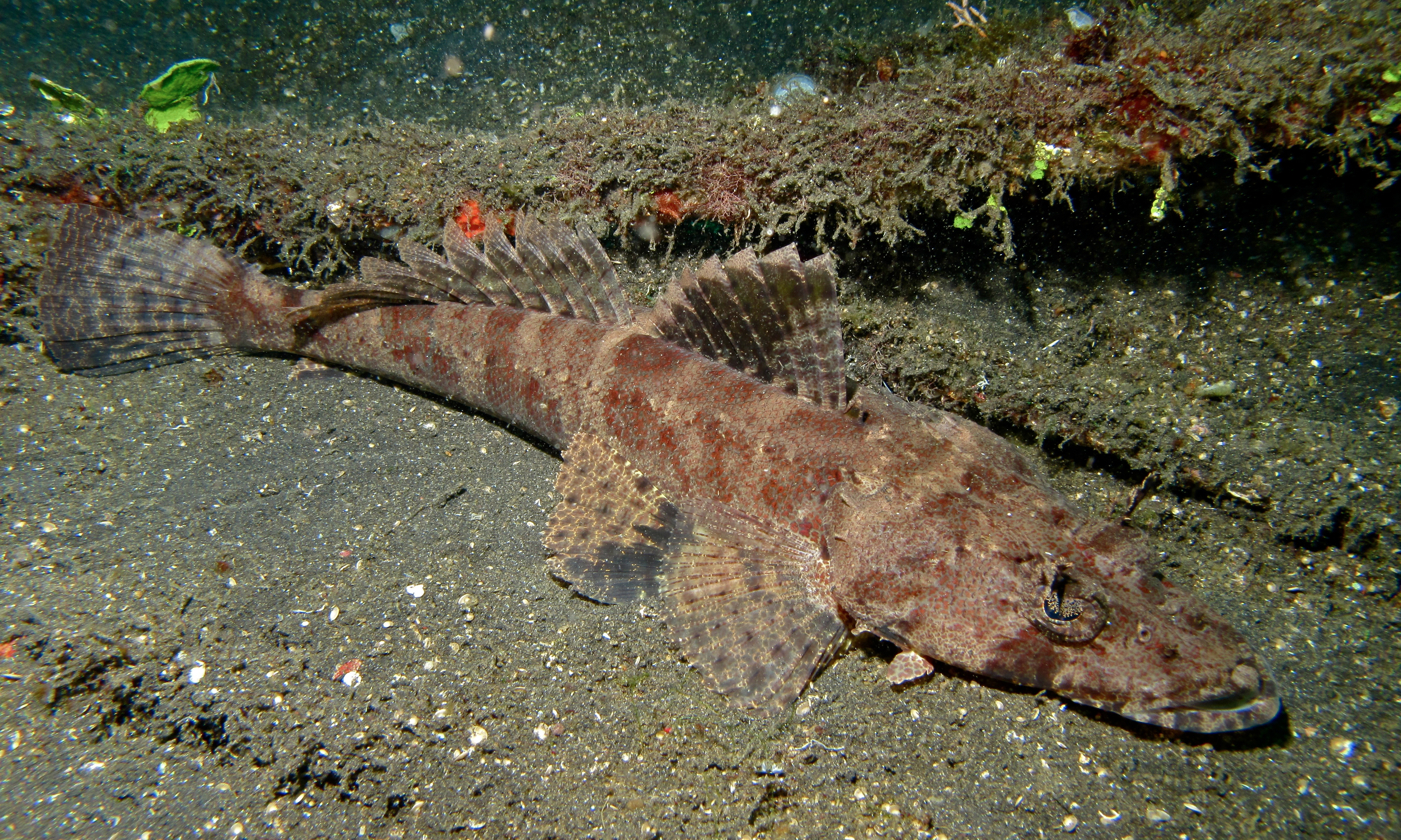 TK1, Lembeh Strait, Sulawesi, INDONESIA